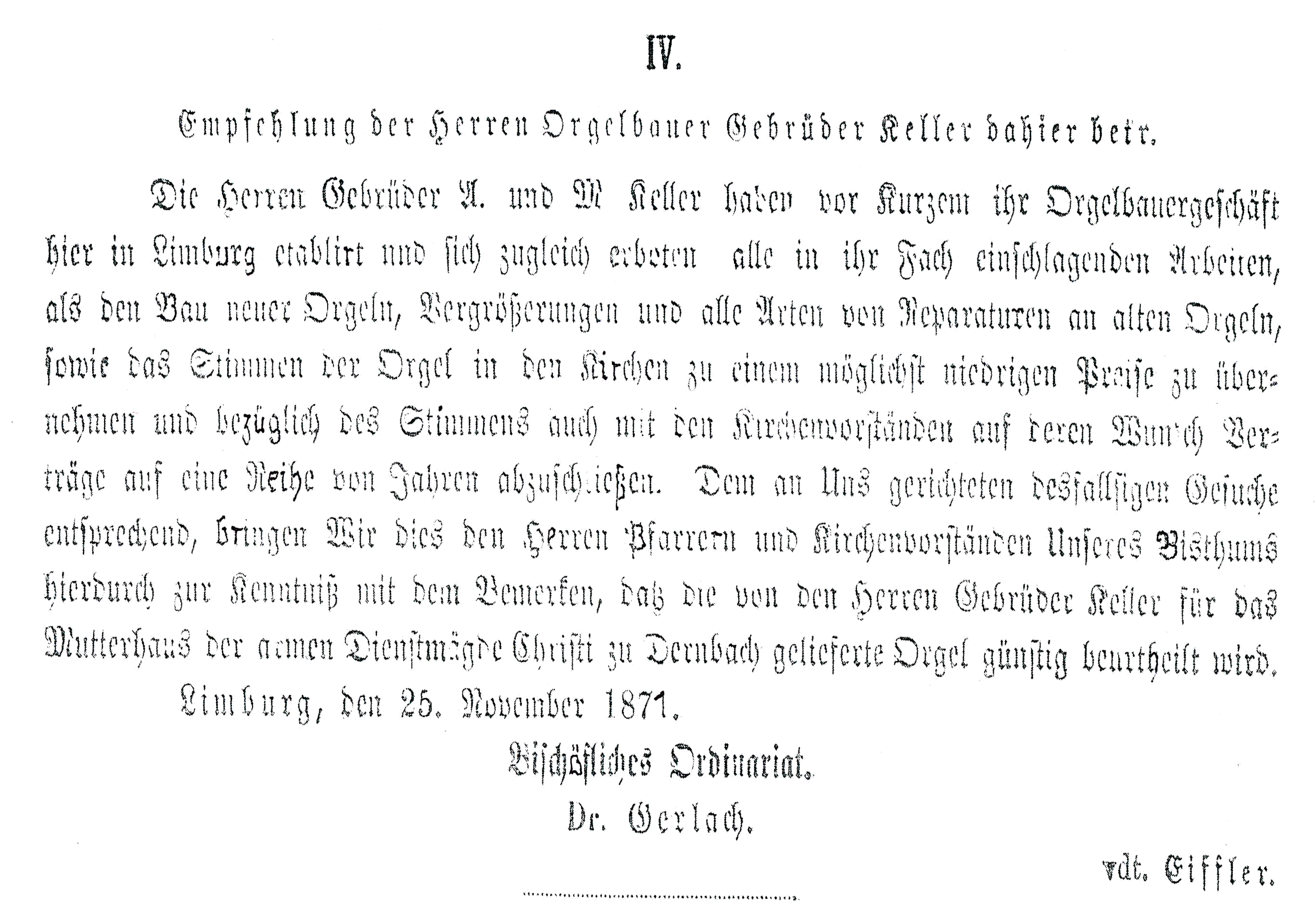 Keller-Orgel Kransberg (1876) - Empfehlung der Gebrüder Keller im Bischöflichen Amtsblatt Limburg 1871 (Nr. 21, 29.11.1871, S. 119)